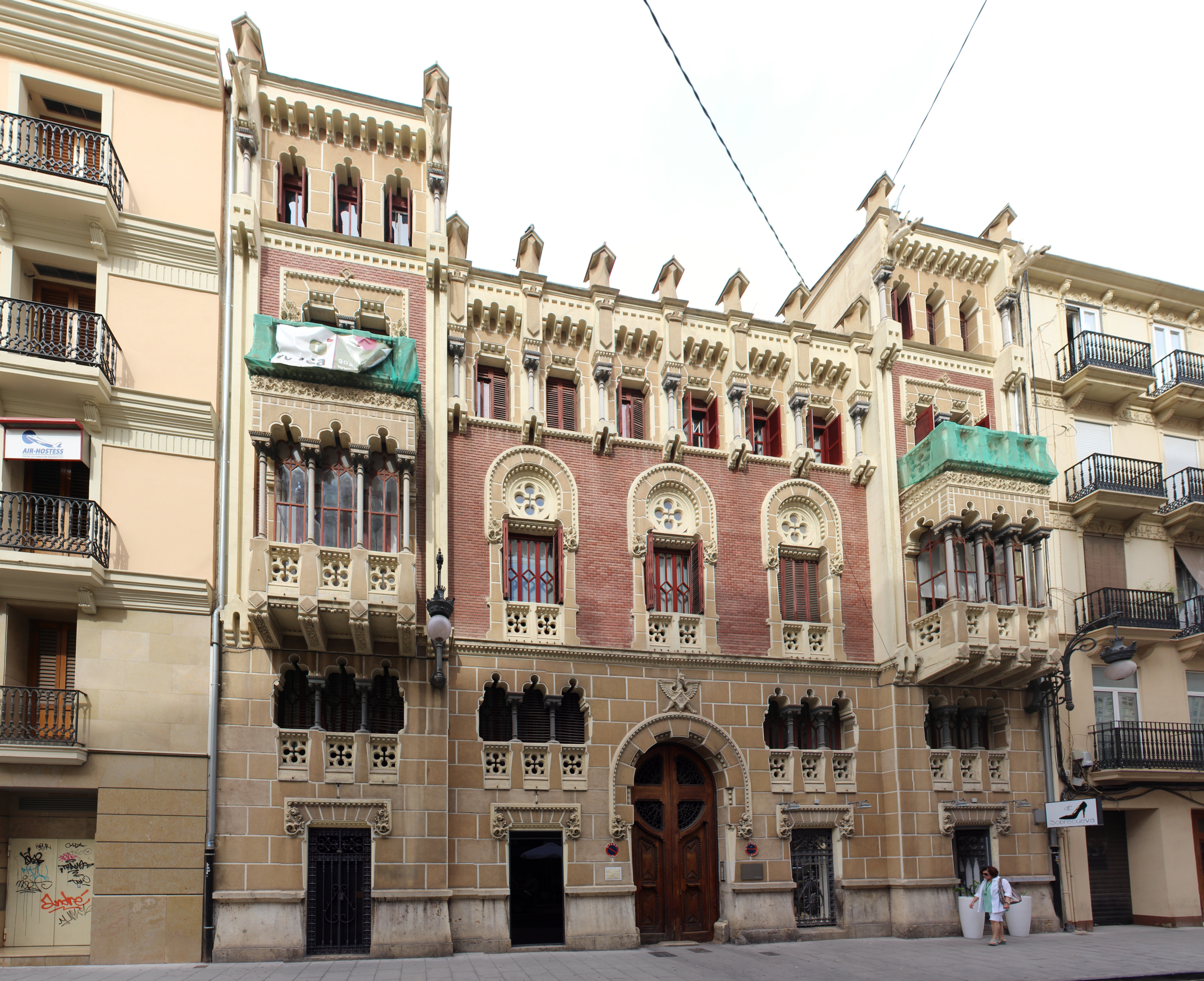 Edificio Cortina I de José Mª Manuel Cortina Pérez en la calle Félix Pizcueta 3, 1896